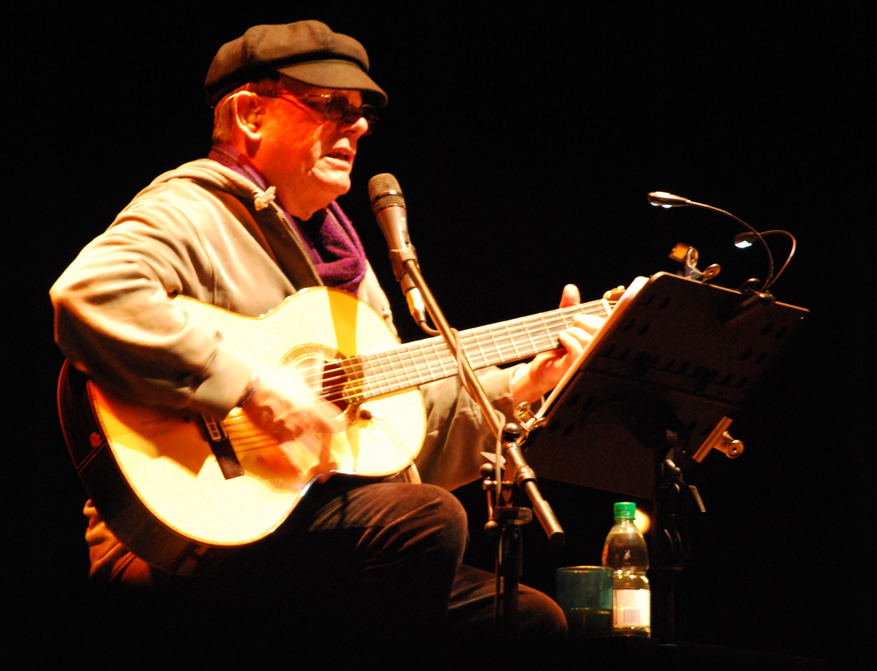 Espectáculo del músico cubano Silvio Rodríguez brindado en el Estadio Charrúa de Montevideo el 16 de noviembre de 2011.